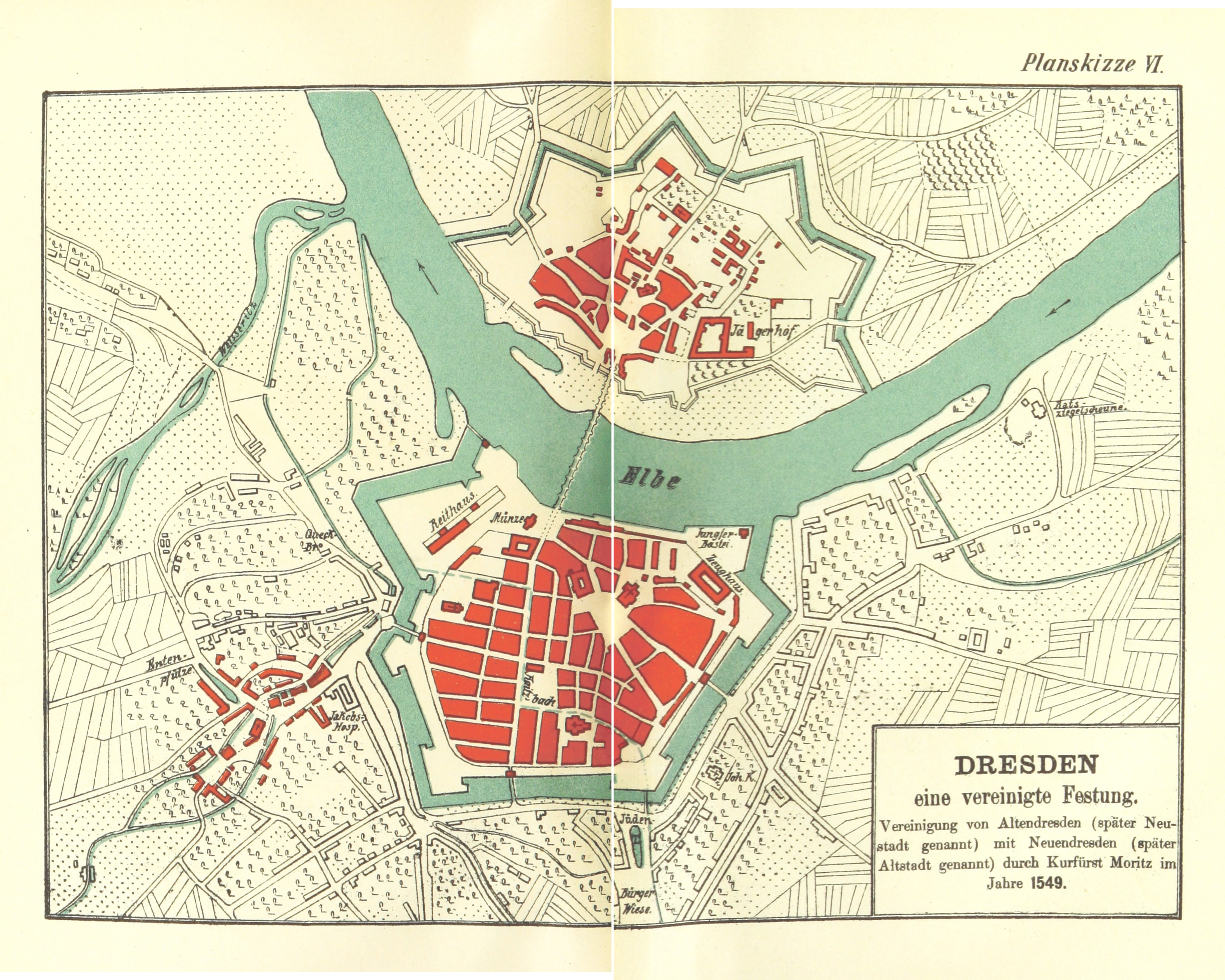 Die geschichtliche Entwickelung der Residenzstadt Dresden